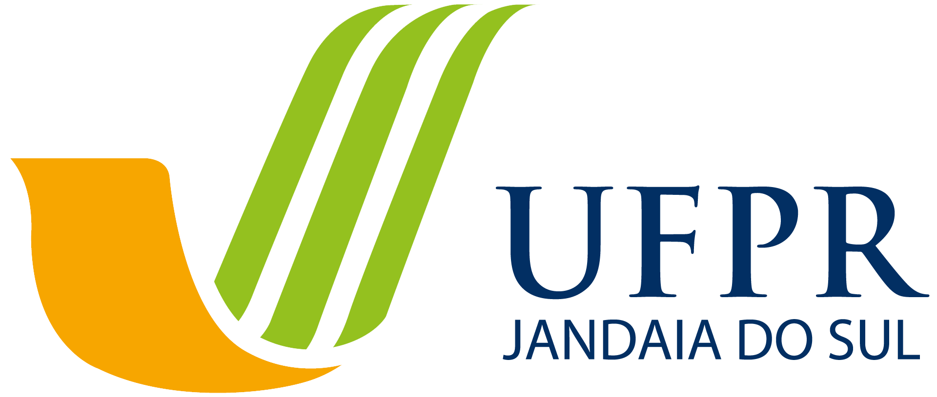 Logo do campus avançado de jandaia do sul da UFPR